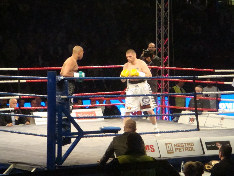 Горан Делић (десно) и Исмаил Абдоул (лијево). Спортска дворана у Лакташима, борба за титулу првака Европе у WBA-EBA верзији.